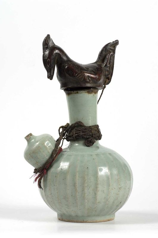 Kruik (onderdeel). Deze waterkruik komt waarschijnlijk oorspronkelijk uit China. De houten stop heeft de vorm van een haan, het symbool van kracht en mannelijkheid. De kruik heeft gediend als medicijnhouder (perminaken), waarin een magische substantie (pupuk) heeft gezeten en was eigendom van een medicijnman (datu). De belangrijkste ingrediënten van de pupuk waren de overblijfselen van een ritueel geofferd kind. De pupuk werd gebruikt om de objecten tot leven te wekken, waardoor zij de beschermers tegen kwade krachten en voorvechters in de strijd (pangulubalang) werden.. Aardewerken waterkruik met stop in vogelvorm gebruikt als medicijnhouder Unknown language: buli-buli Perminaken